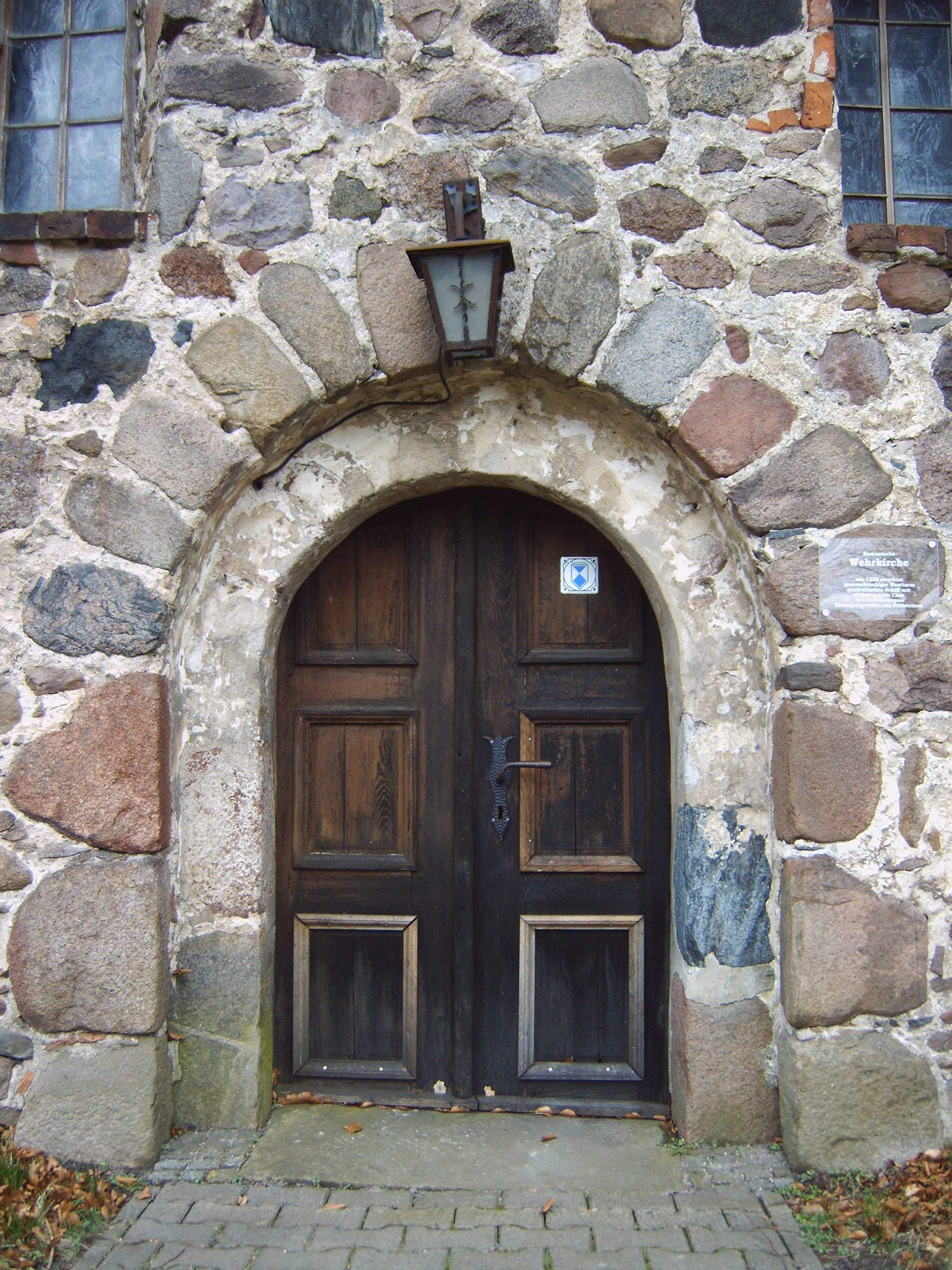 Eingangstür zur Sankt-Sebastian-Kirche in Mahlsdorf, Stadt Salzwedel